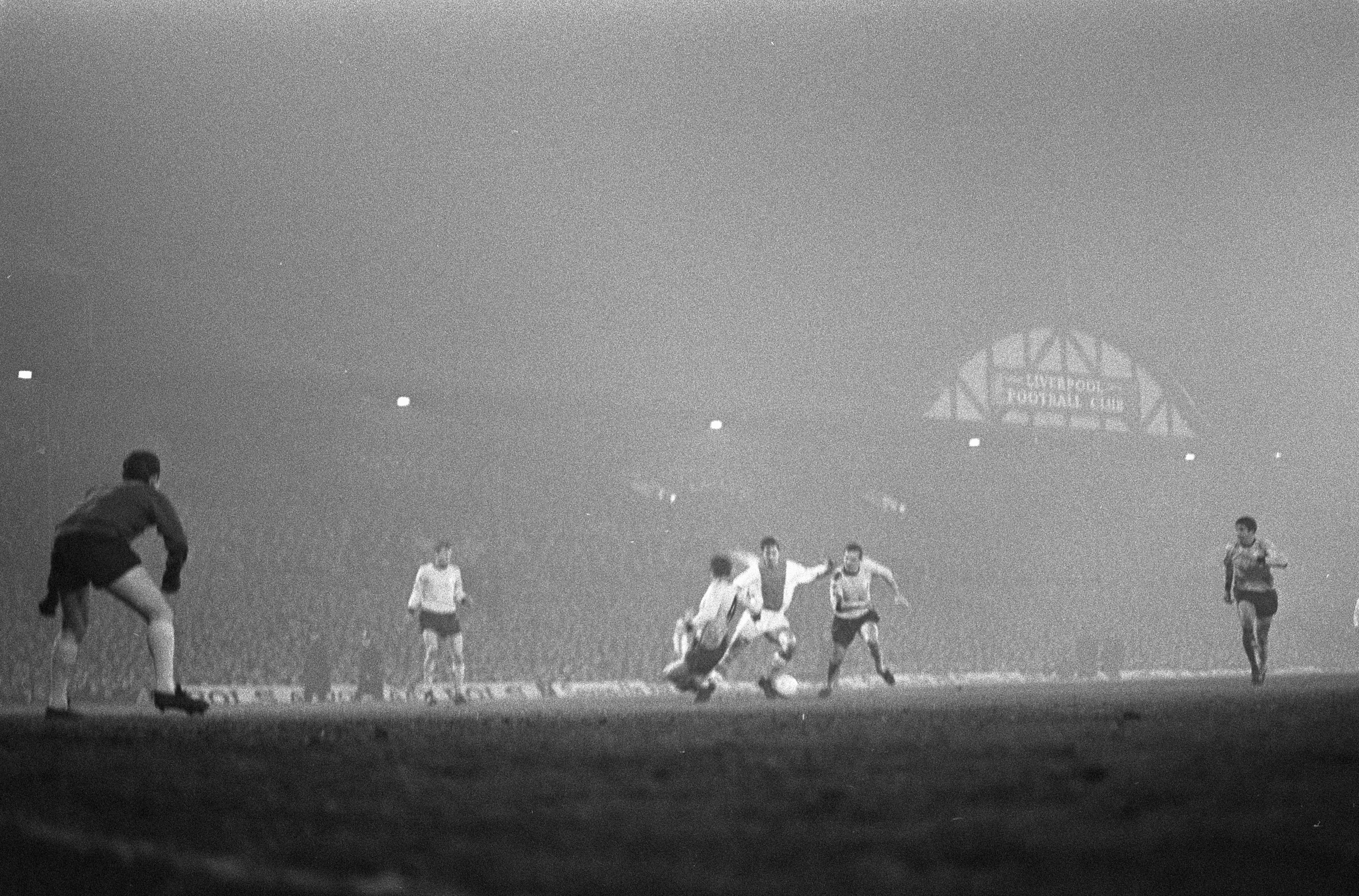 Collectie / Archief : Fotocollectie Anefo Reportage / Serie : [ onbekend ] Beschrijving : Liverpool tegen Ajax 2-2, spelmomenten Datum : 14 december 1966 Locatie : Liverpool Trefwoorden : sport, voetbal Instellingsnaam : AJAX Fotograaf : Kroon, Ron / Anefo Auteursrechthebbende : Nationaal Archief Materiaalsoort : Negatief (zwart/wit) Nummer archiefinventaris : bekijk toegang 2.24.01.05 Bestanddeelnummer : 919-8790